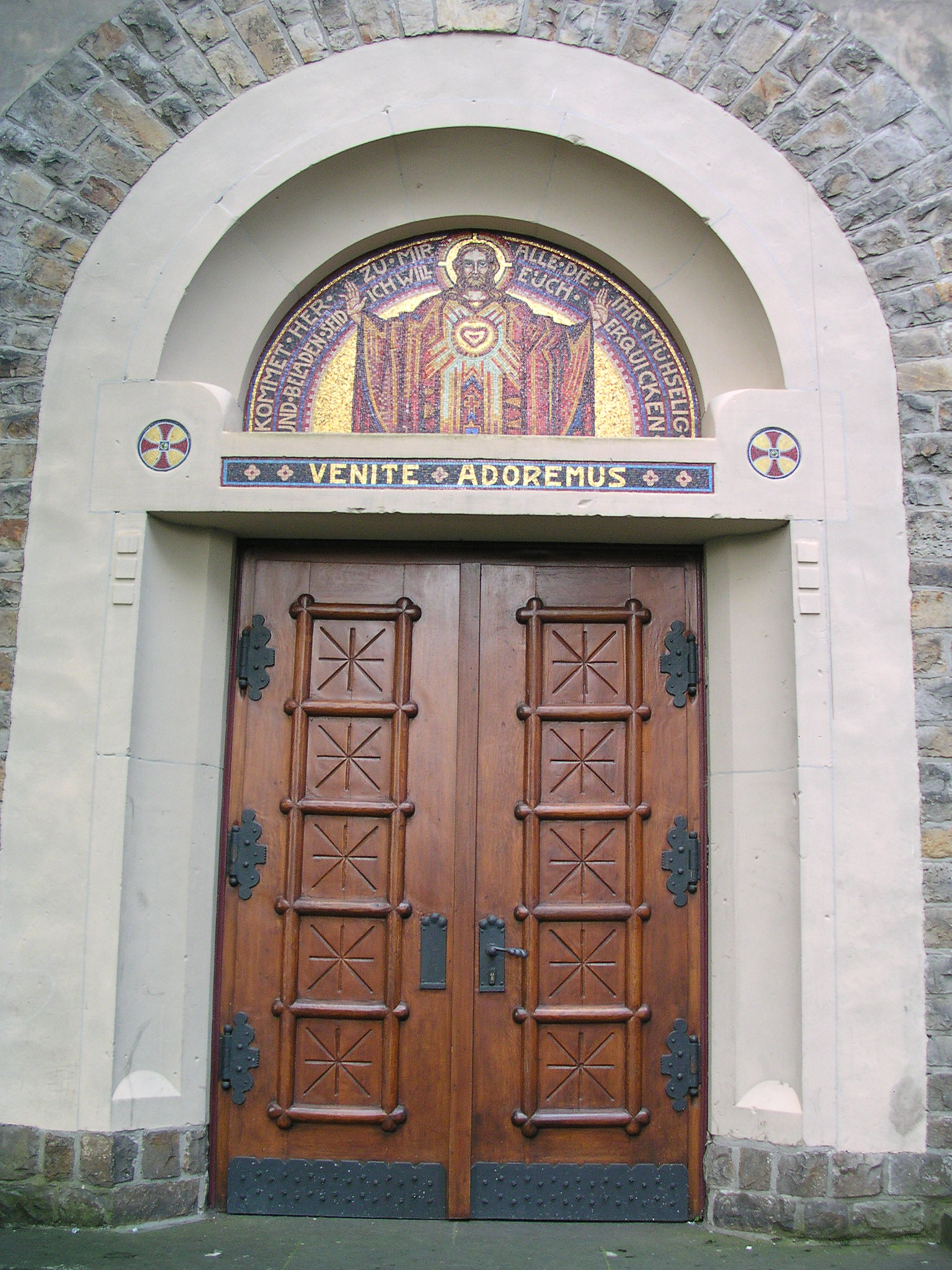 Eschweiler Bergrath, katholische Antoniuskirche